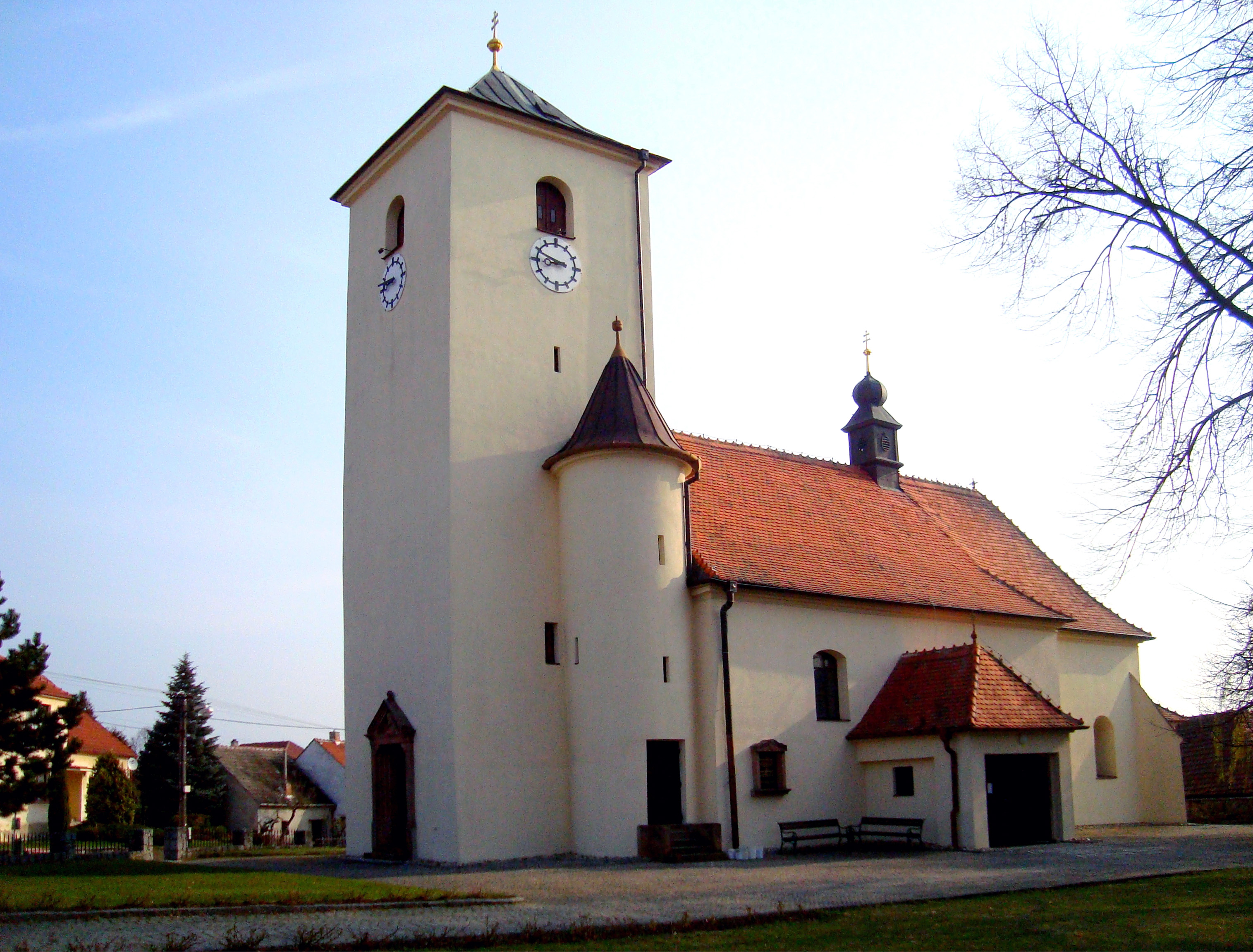 Zbraslav kostel svatého Jiljí